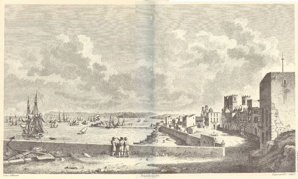 Gravat d'Alexandre Laborde (1773-1842) de la ciutat d'Alacant (l'Alacantí, País Valencià) a principis del segle XIX.